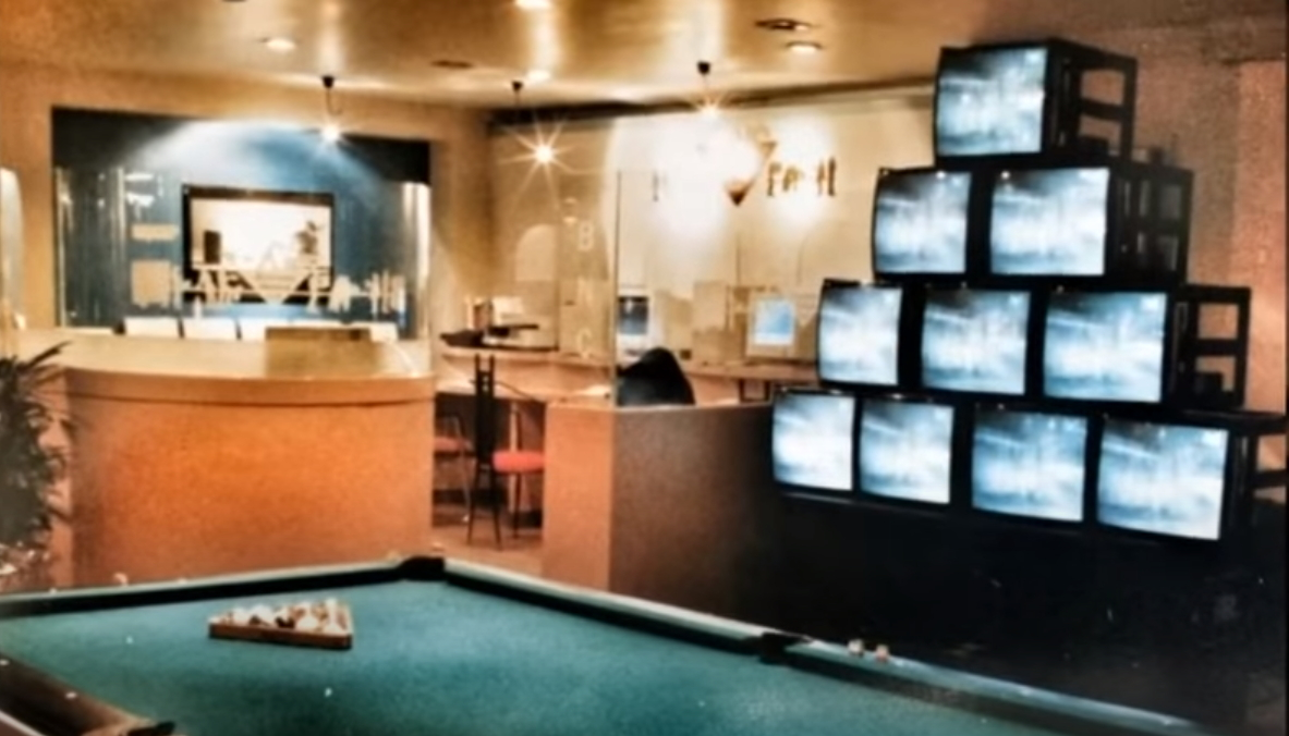 '93 대한민국 서울 홍익대학교앞 인터넷 카페 Bnc .코인(동전)으로 인터넷 사용이 가능했다.